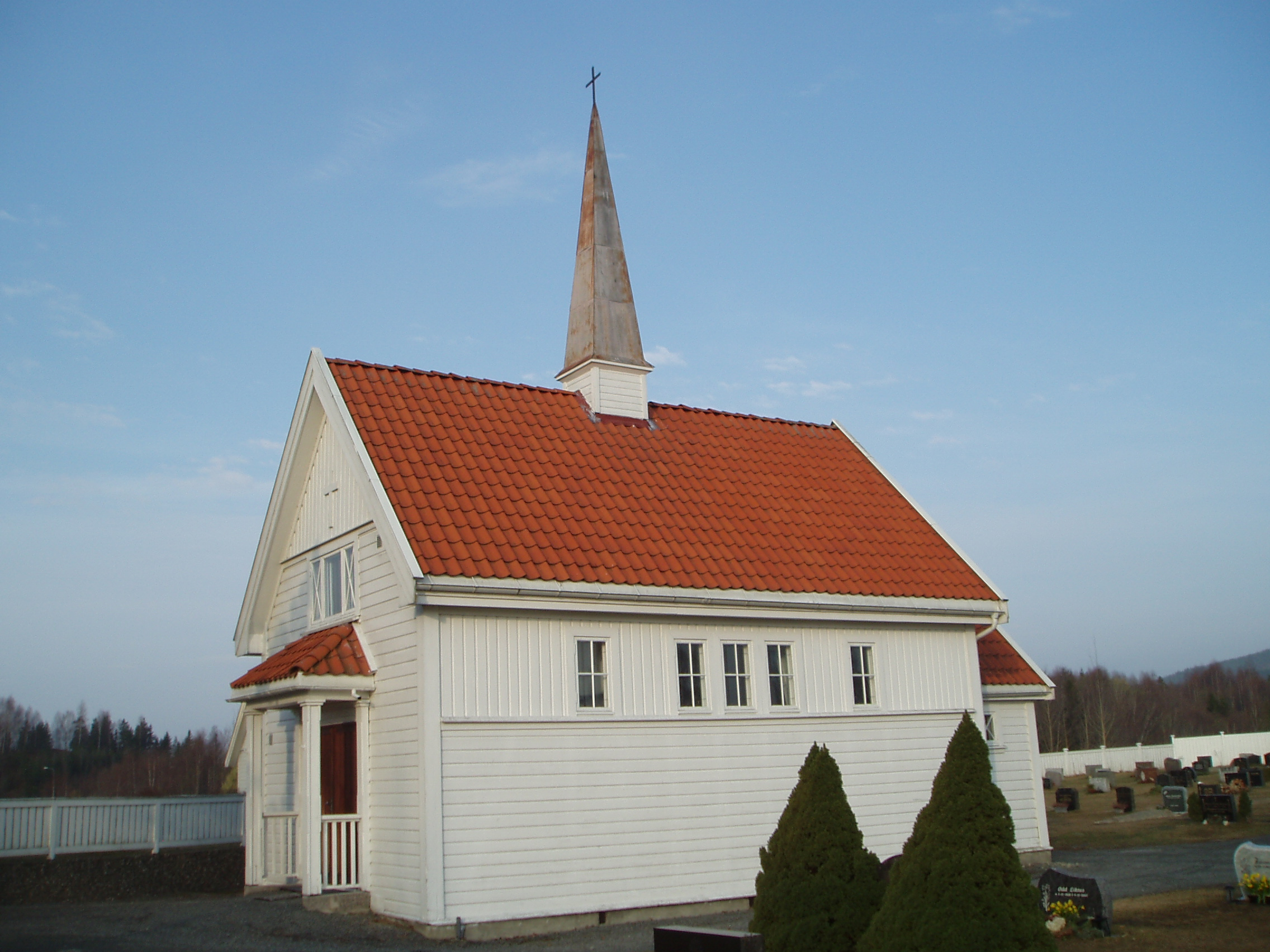 Kapellet til Randsfjord kirke på Jevnaker i Oppland fylke i Norge.